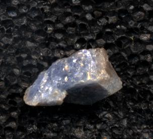 ein Saphir von mir gescannt. Bild steht unter der FDL